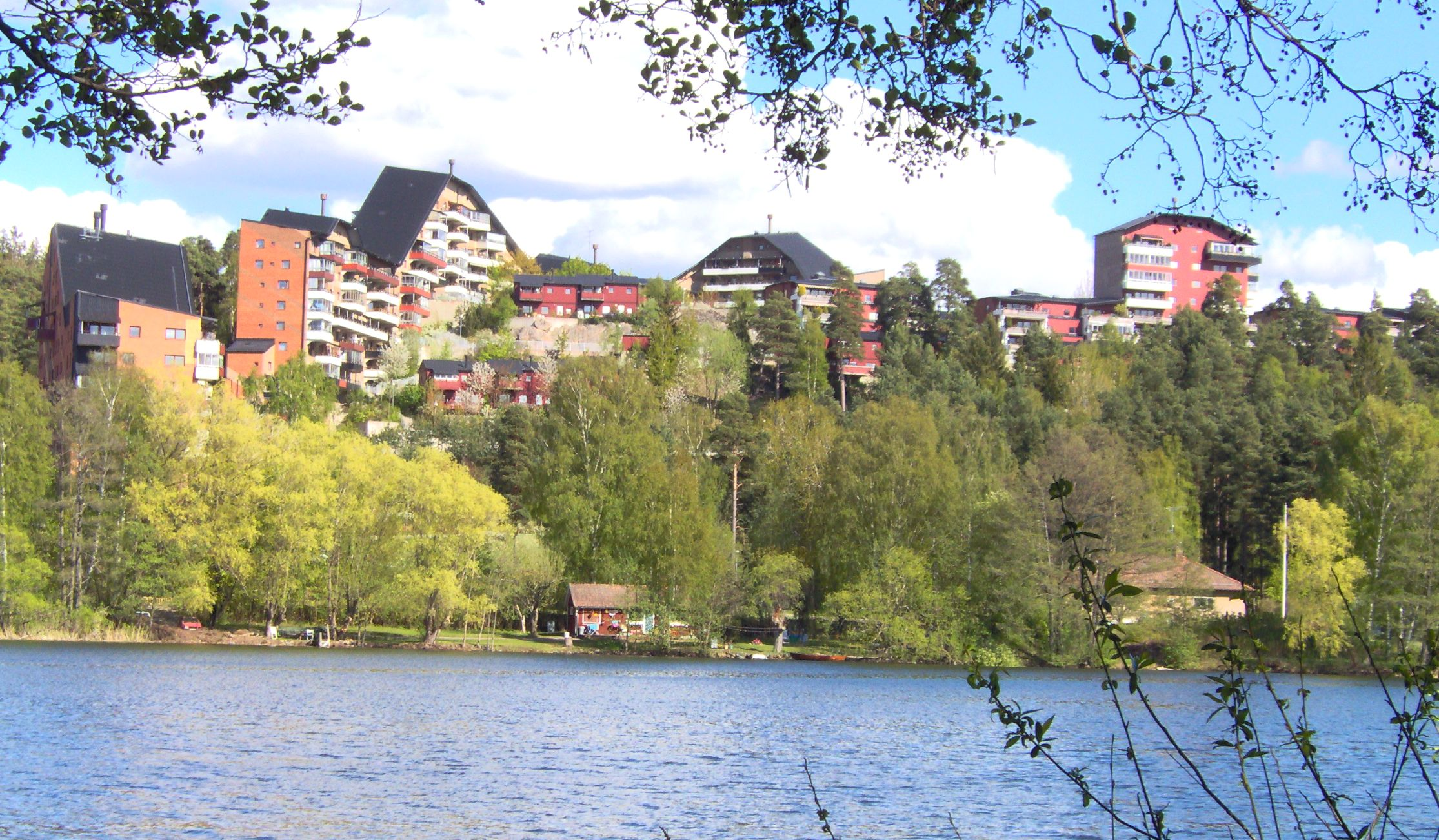 Myrstugeberget, Masmo, Huddinge, Sydvästra Storstockholm. 2006.